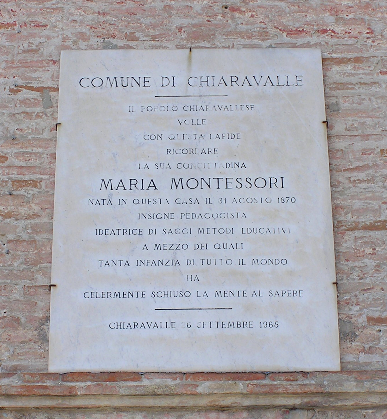 La foto rappresenta la targa posta sulla facciata della casa natale della celebre educatrice e pedagogista Maria Montessori, nata a Chiaravalle, nei pressi di Ancona, il 31 agosto 1870.